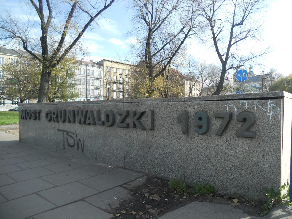 Murek upamiętniający rok zakończenia budowy Mostu Grunwaldzkiego przy ul. Józefa Dietla w Krakowie.